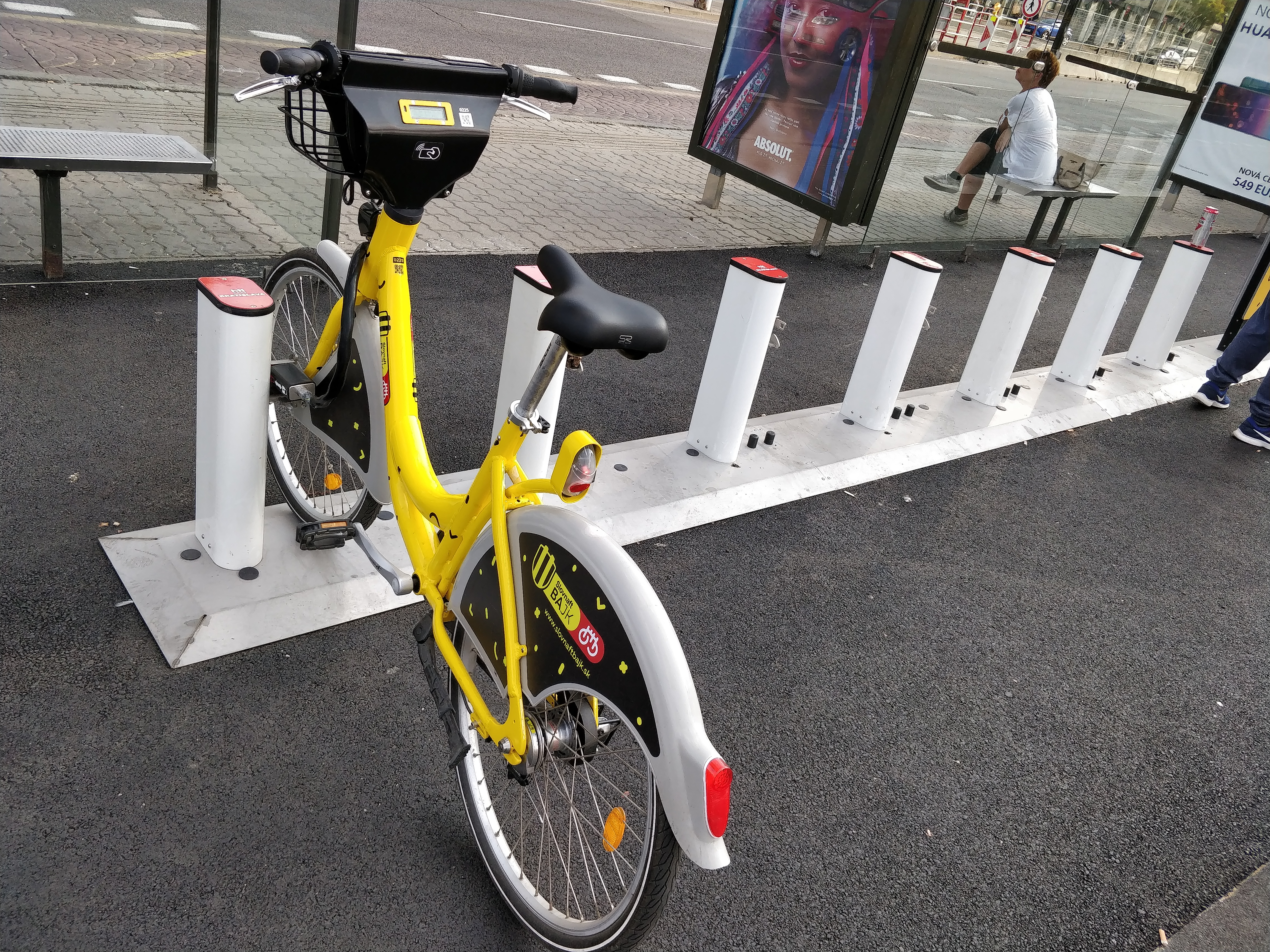 Slovnaft Bajk docking station Trnavské mýto, Bratislava